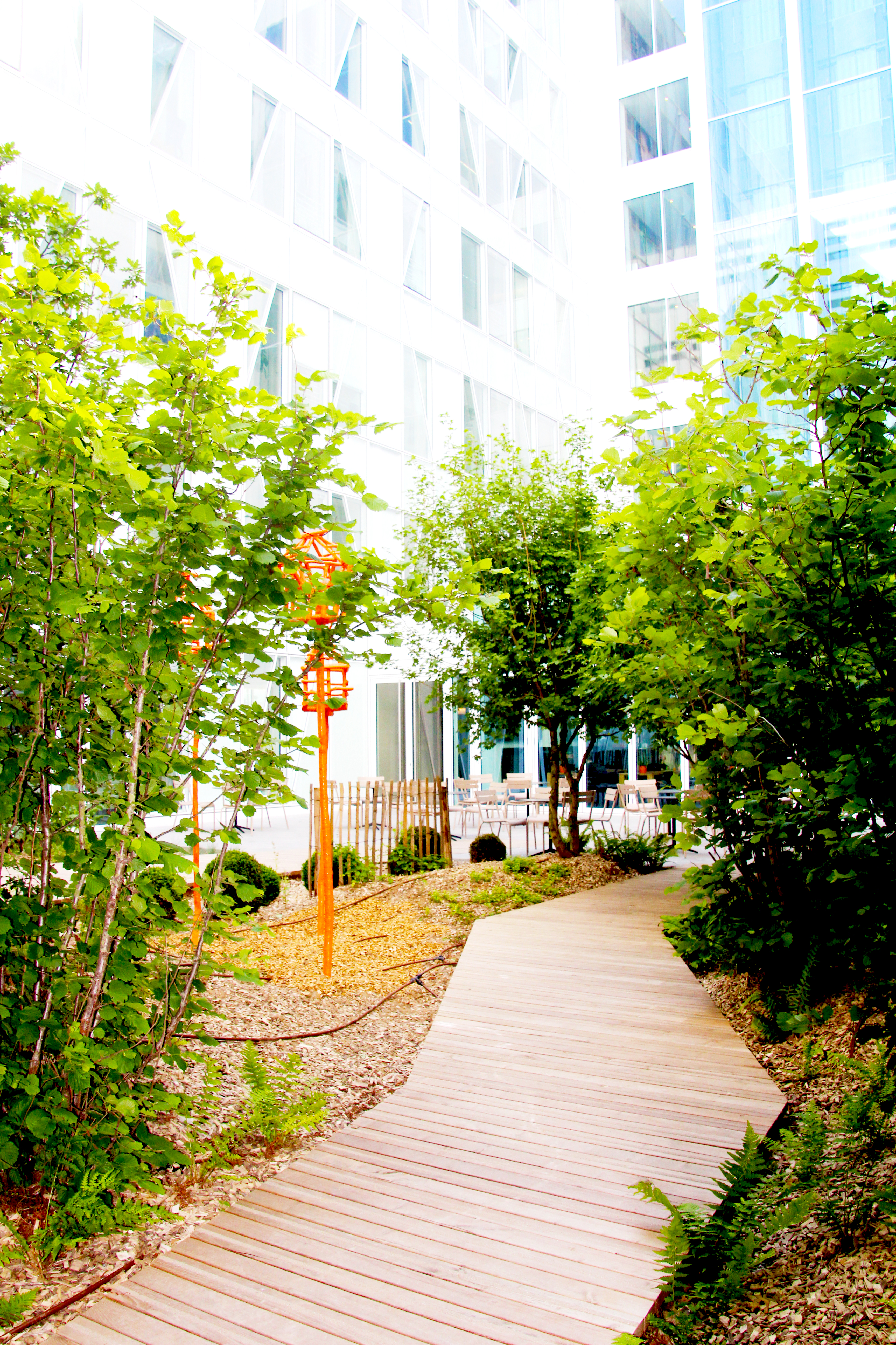 Bâtiment des locaux du Groupe Rocher situés à Issy les Moulineaux